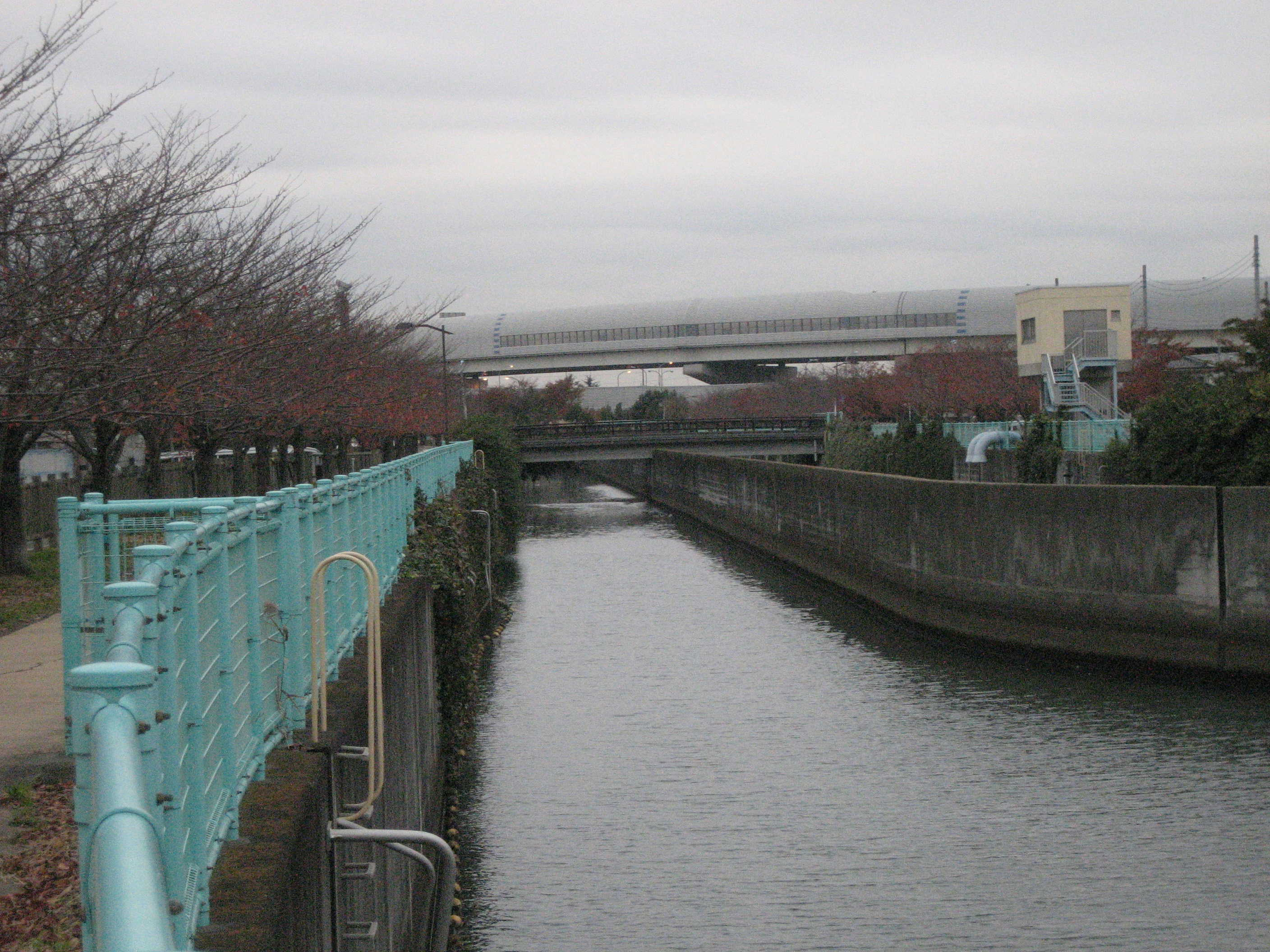 綾瀬川放水路八潮市内